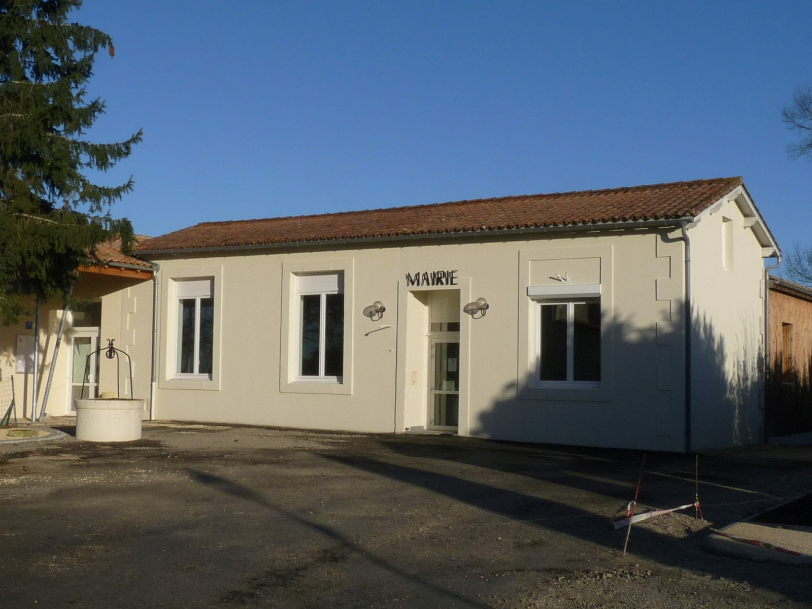 Mairie d'Expiremont, Charente-Maritime, France